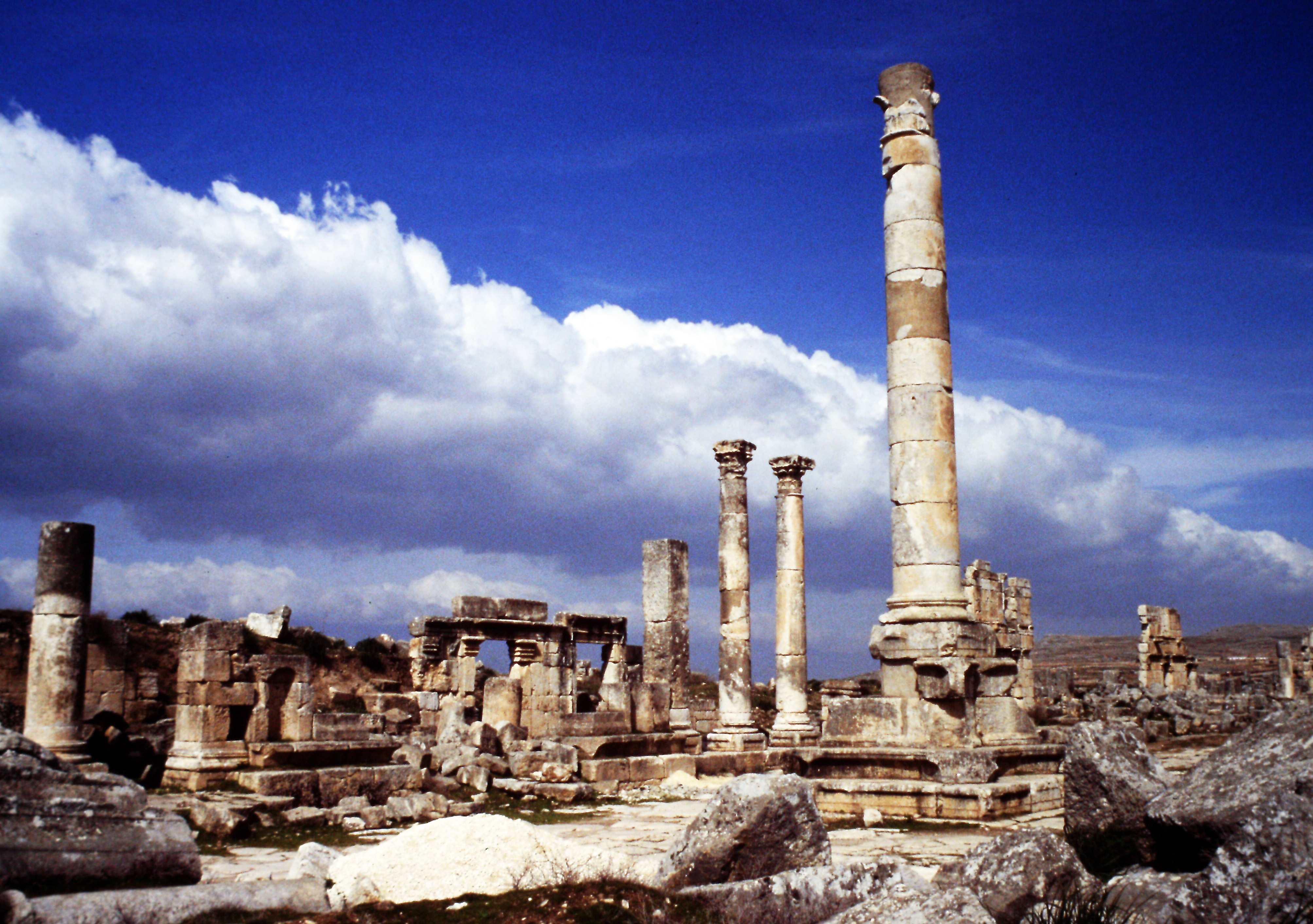 Apamea, 1993